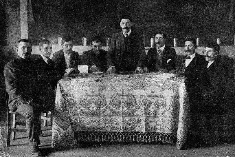 Directorio Antiforista de Teis en 1908, fotografía en Vida Gallega. De esquerda a dereita: José Martínez (vocal), Julián Estévez (contador), Arturo Nieto (vicesecretario), Jacinto Crespo (secretario), José Lago (presidente), Ángel Lago (vicepresidente), Enrique Martínez (vocal) e José Covelo (vocal).